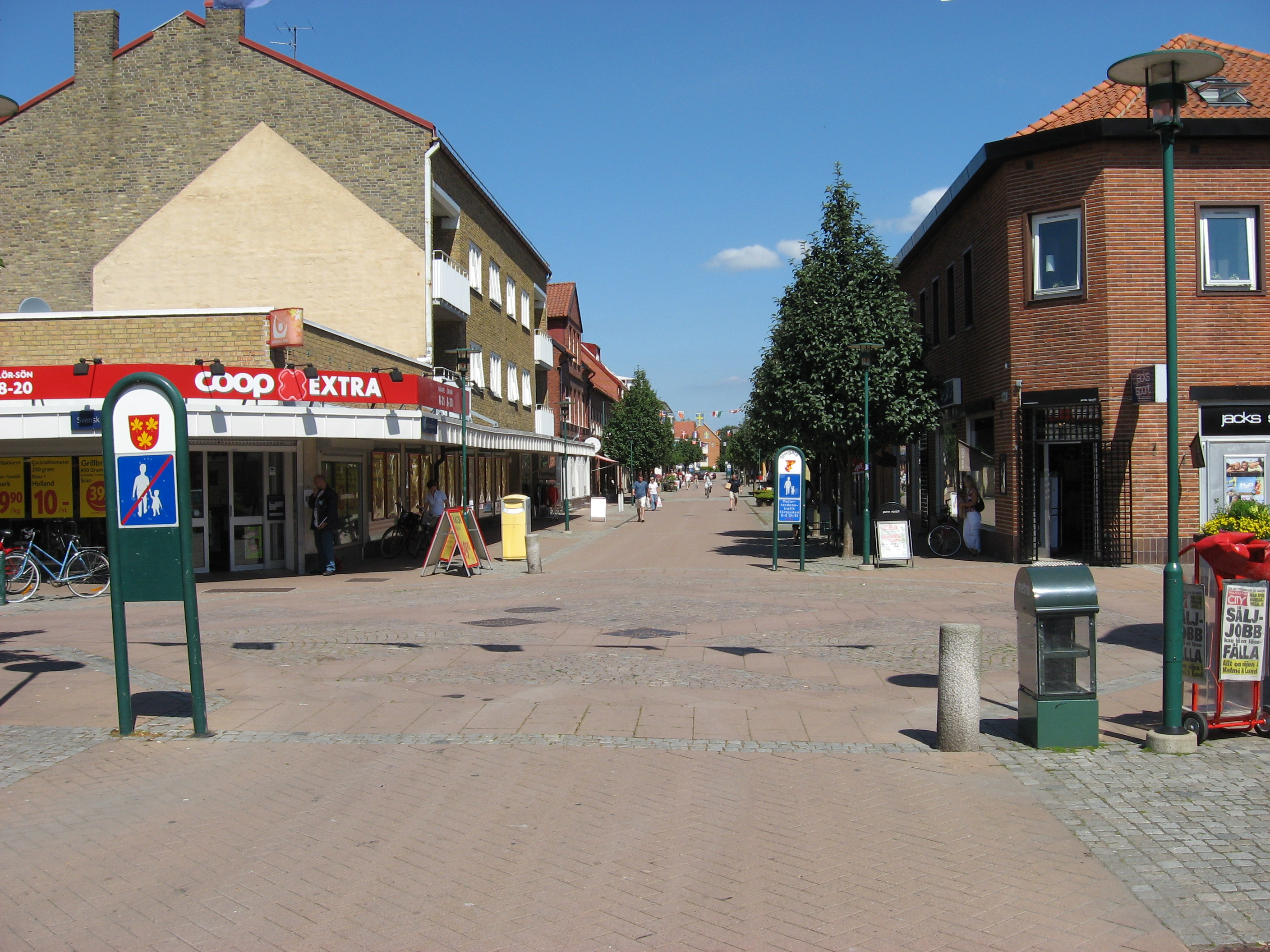 Storgatan, a street in Svedala, Skåne, Sweden